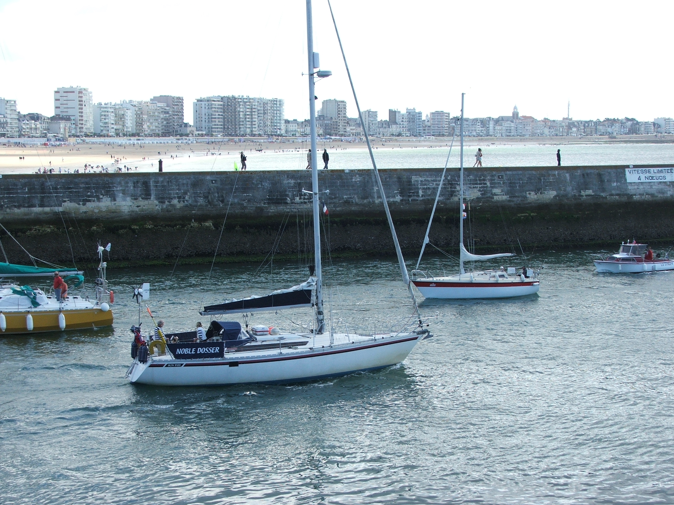 Hafeneinfahrt von Les Sables d'Olonne Eigenes Foto